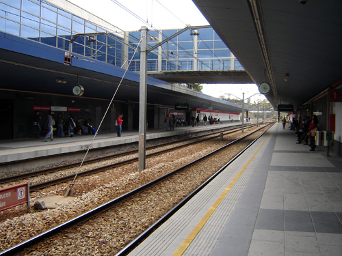 Estación de Cantoblanco-Universidad de Cercanías RENFE. Foto hecha el 6 de noviembre de 2006 desde dentro de la propia estación.